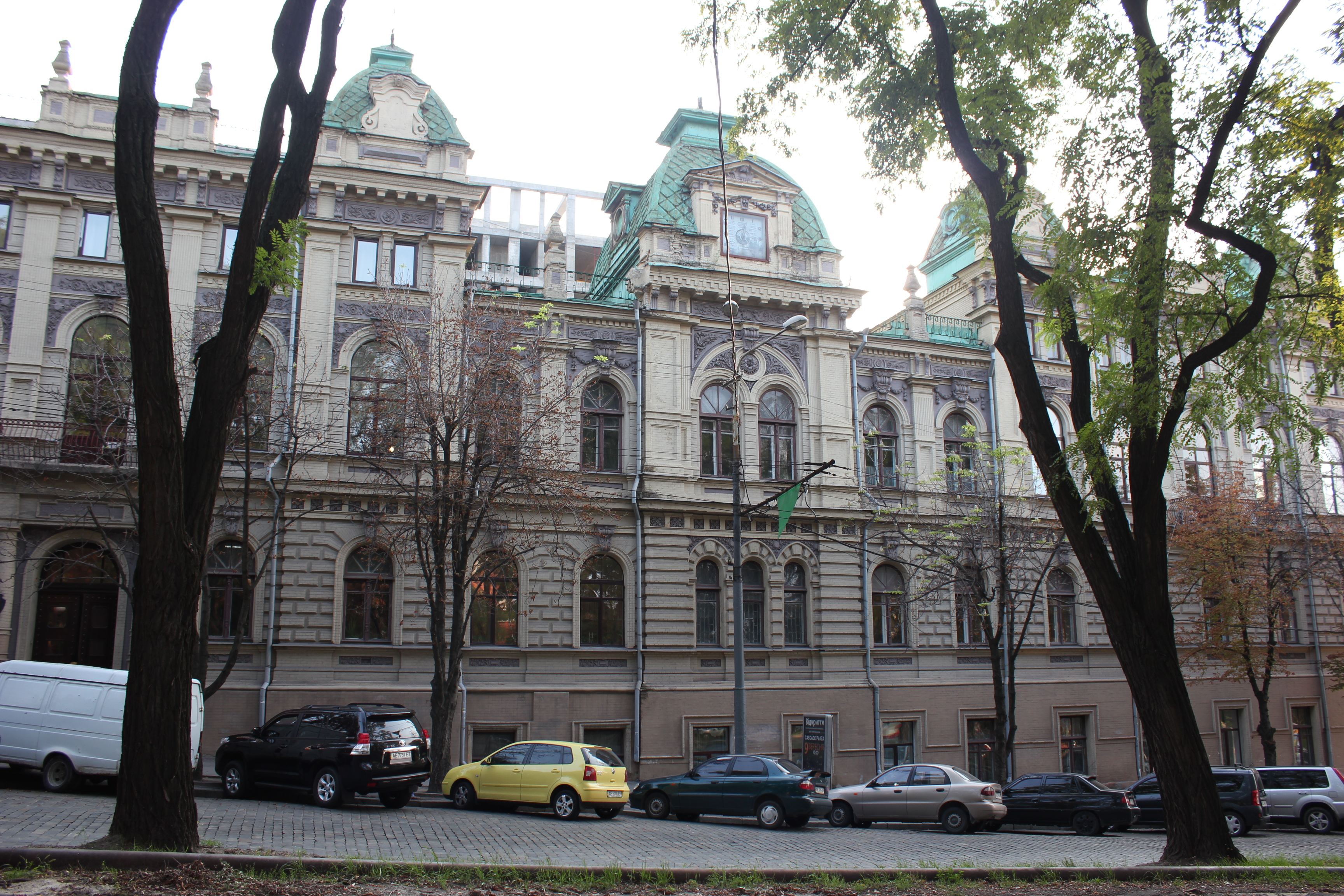 Der Dnipropetrowsker Stadtrat